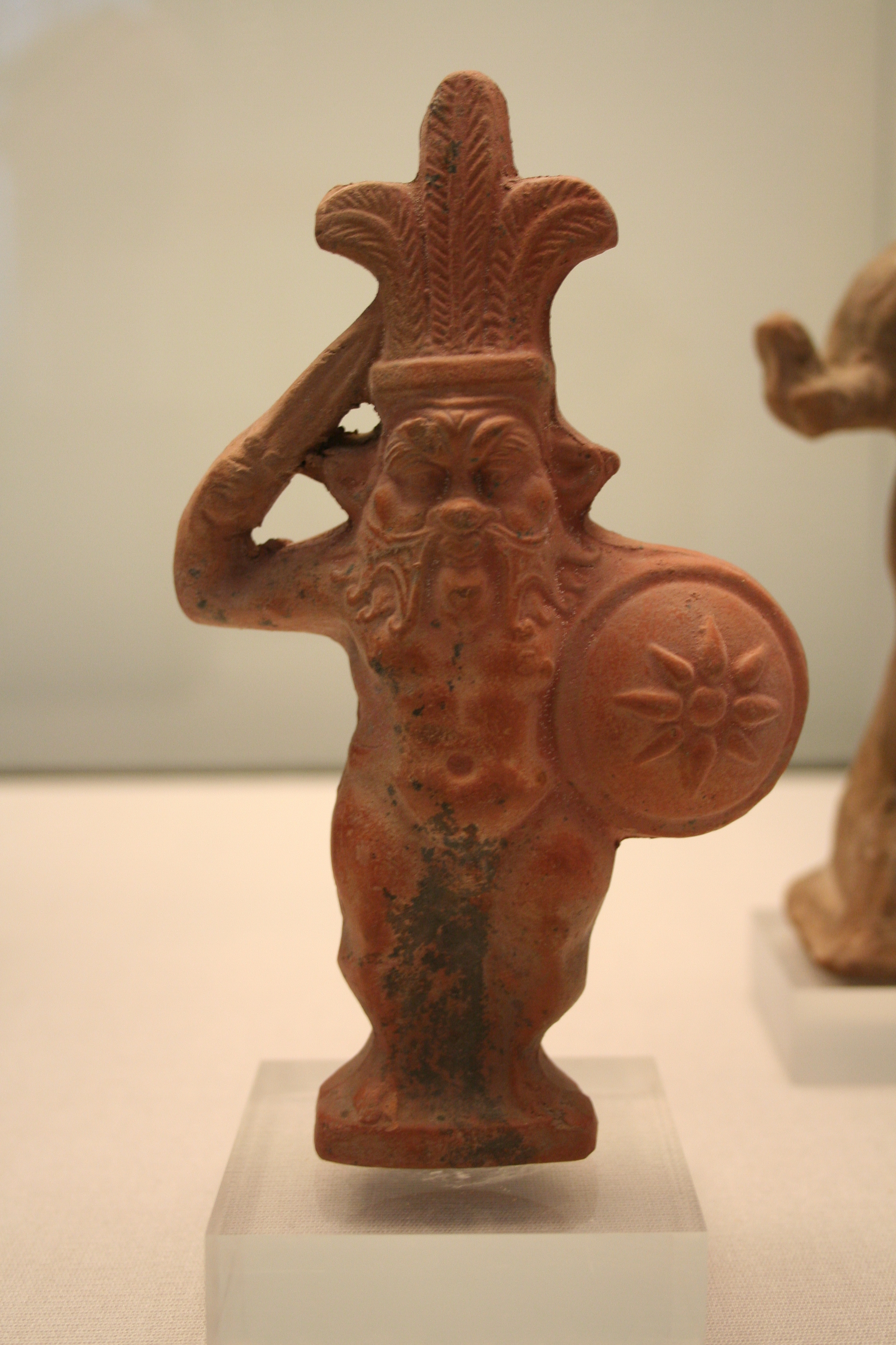 Terrakotta-Figur des Gottes Bes, 1.-3. Jh. n. Chr., wohl aus dem Faijum.